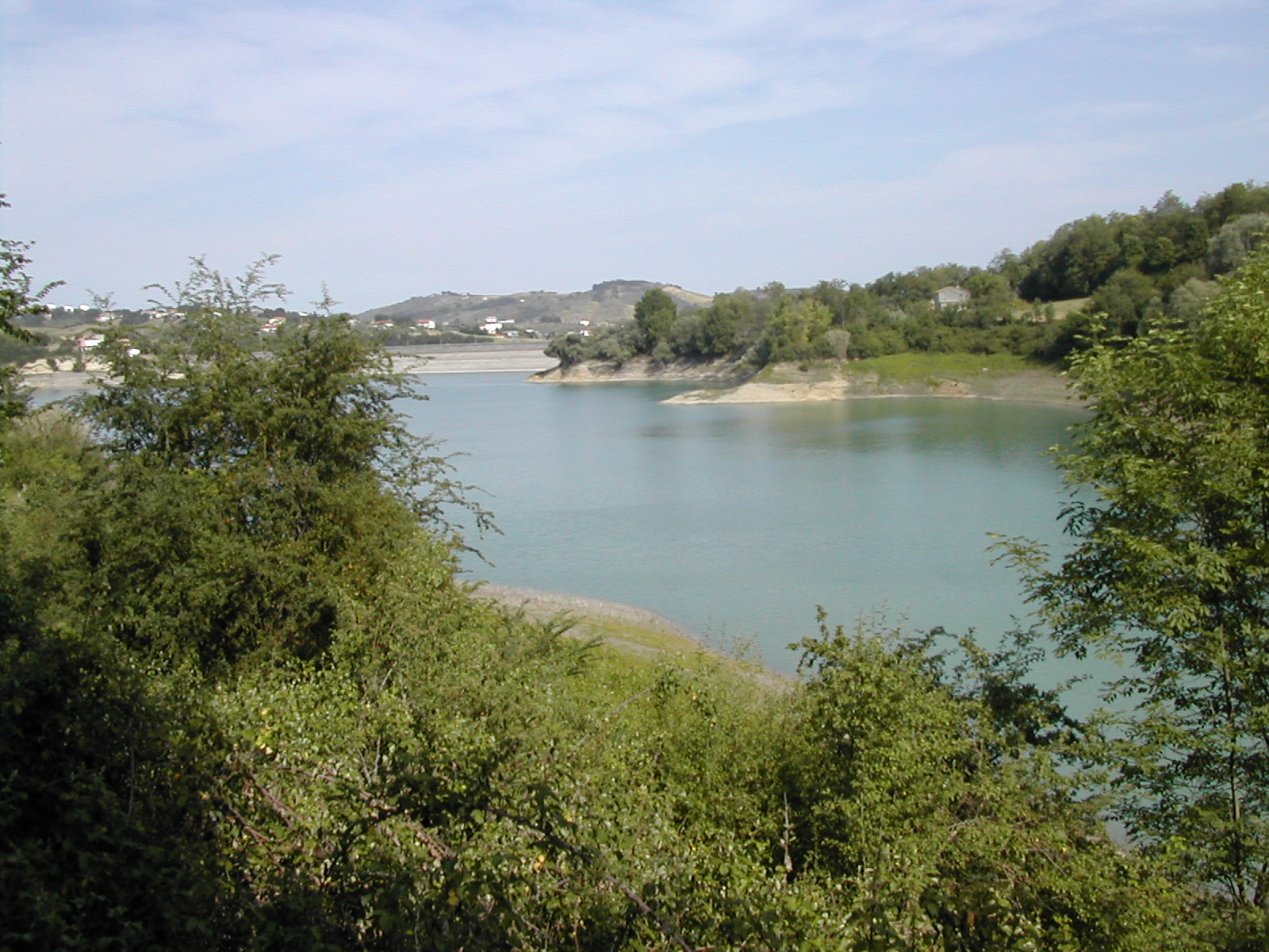 Riserva naturale controllata Lago di Penne